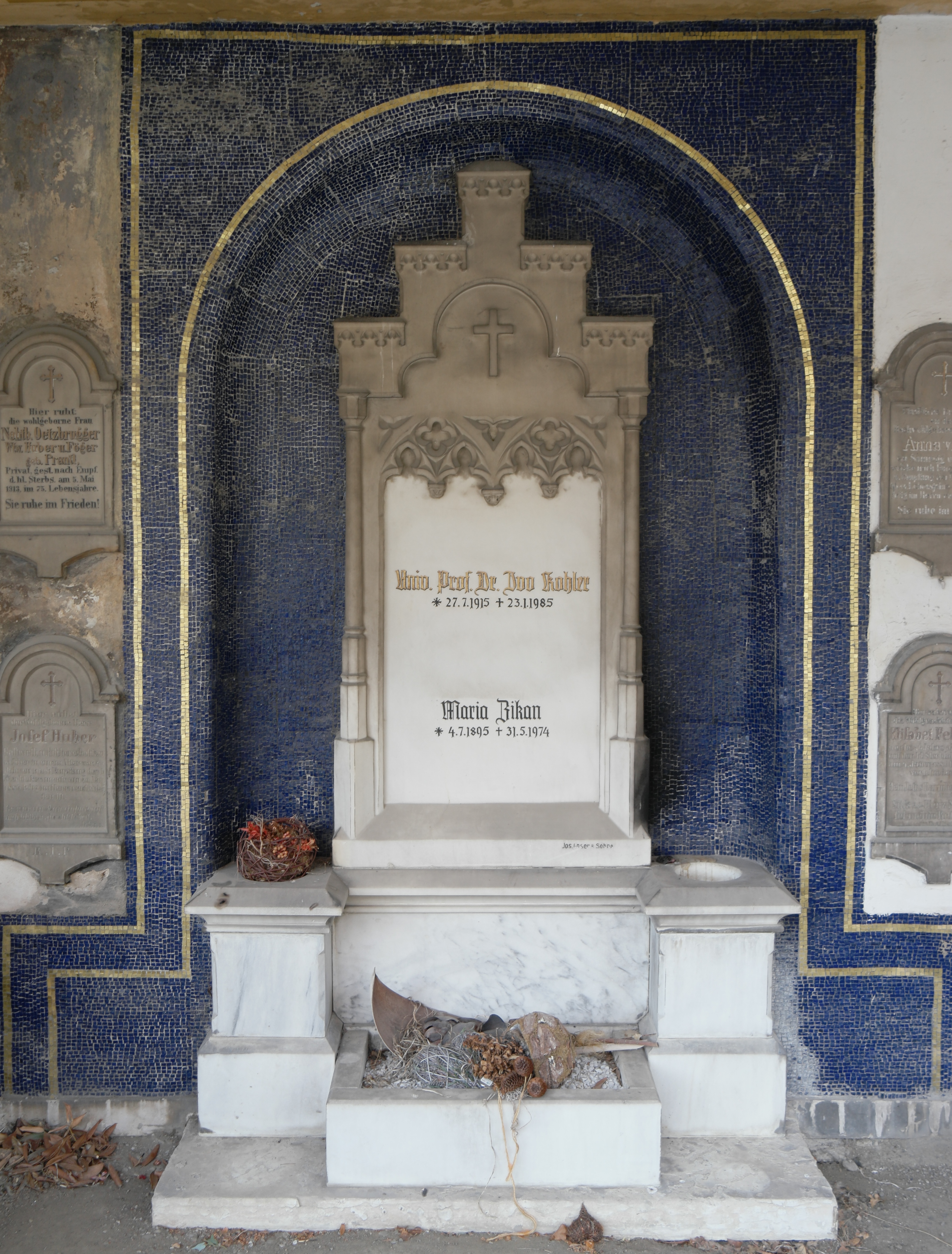 Grab des Psychologen Ivo Kohler (1915-1985) auf dem St. Nikolaus-Friedhof Innsbruck